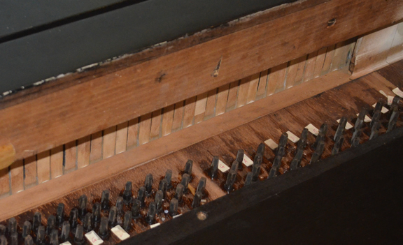 De unieke pinnen op de voorkant van de mnipiano die kunnen gebruikt worden om de instrument te stemmen zonder heel het instrument open te maken